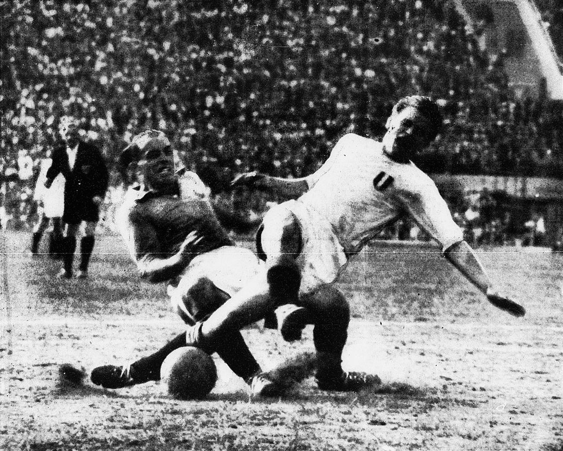 Genova, stadio Luigi Ferraris, 3 giugno 1951. Il difensore della Francia, Roger Marche (a sinistra), atterra in area l'attaccante dell'Italia, Giampiero Boniperti (a destra): un fallo sanzionato con il calcio di rigore che, successivamente trasformato da Gino Cappello, decreterà il 4-1 finale con cui gli azzurri batteranno, in amichevole, i bleus.